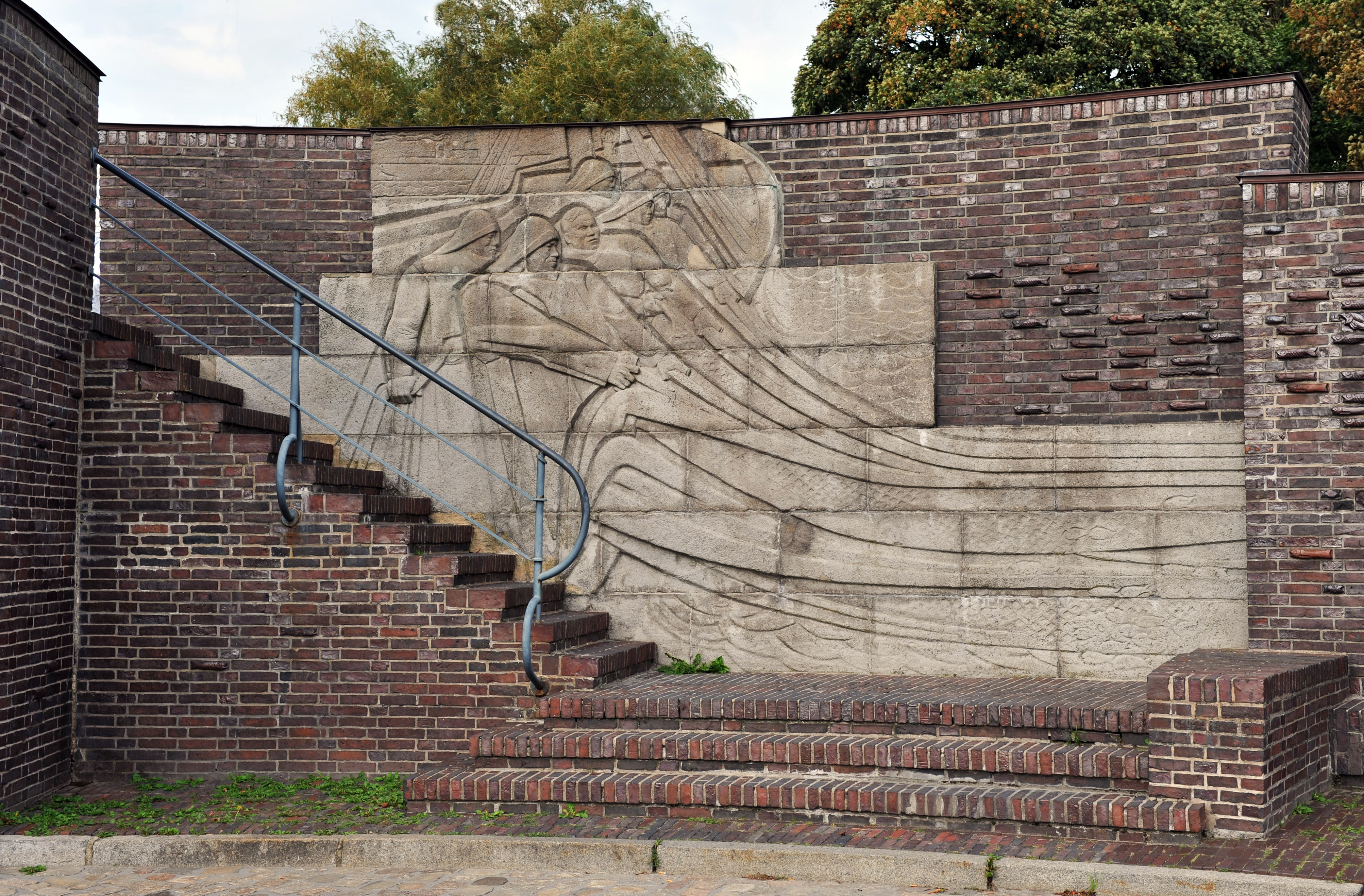 Historical building in Bremerhaven, northern Germany Busse-Denkmal, An der Geeste, 1936 von Fritz Höger Das abgebildete Objekt ist ein geschütztes Kulturdenkmal in der Freien Hansestadt Bremen, mit der Nr. 1634 beim Landesamt für Denkmalpflege registriert.